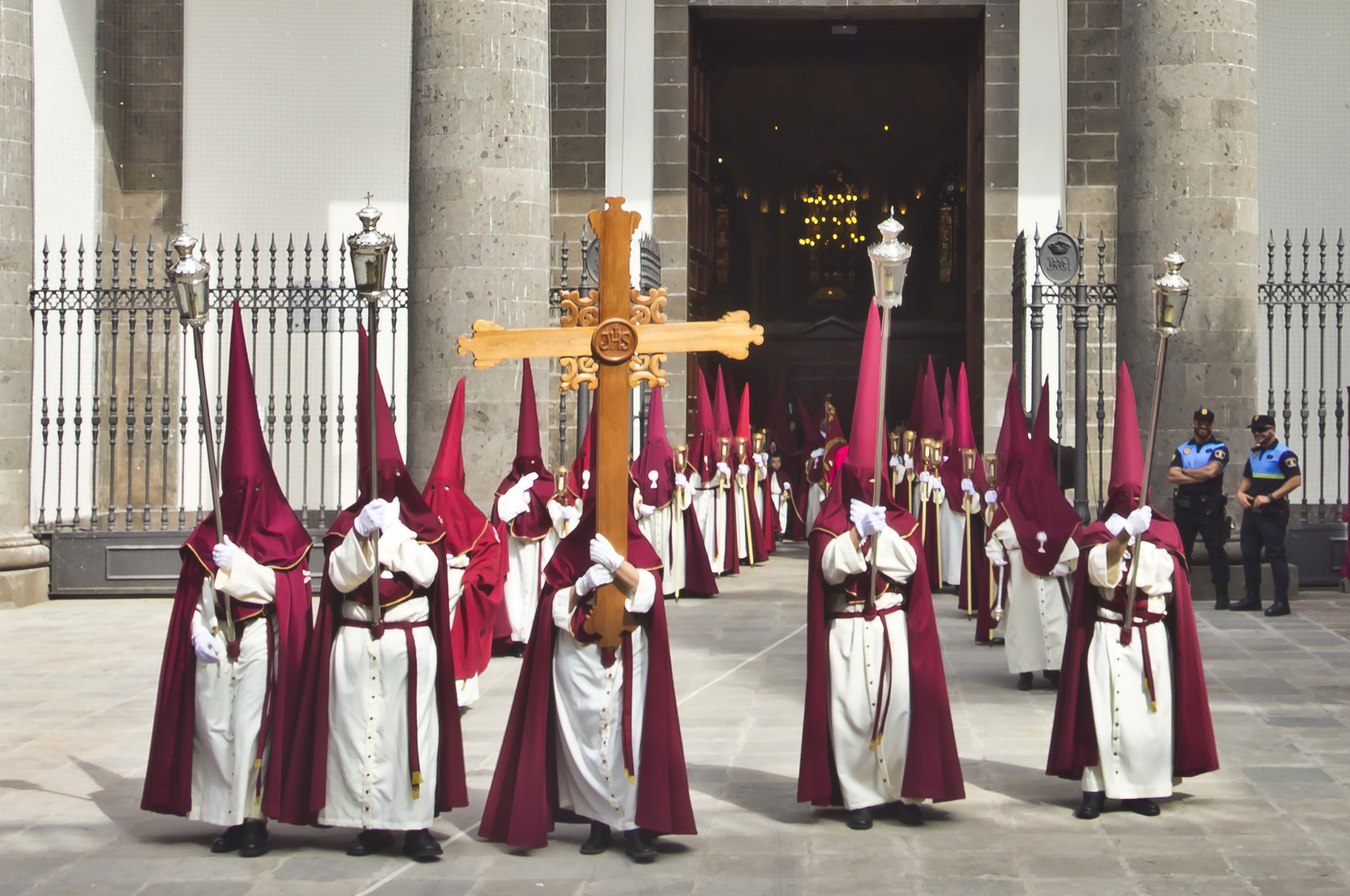 Hermandad del Santísimo de la Santa Iglesia Catedral y Sección Penitencial